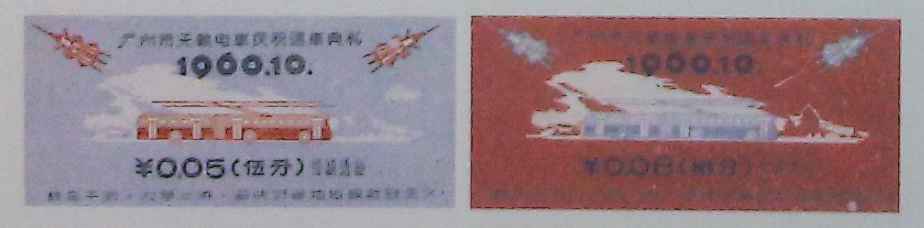 粵語: 1960年嗰时发行嘅通车庆典车飞